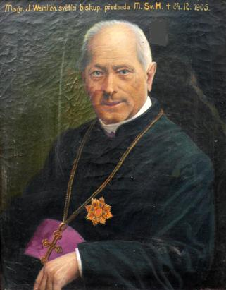 Jan Weinlich (1831 - 1905), Římskokatolický kněz a světící biskup olomoucký.